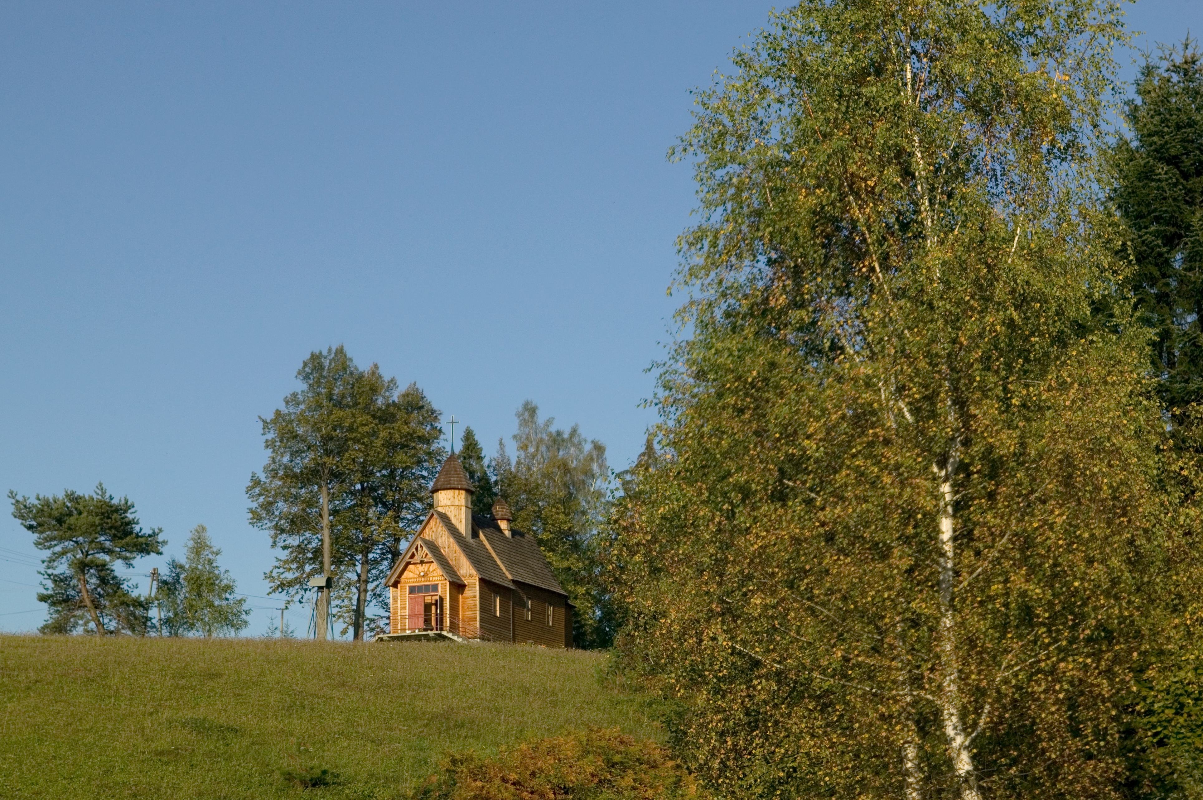 Oderne, kaplica rzymskokatolicka pod wezwaniem św. Stanisława